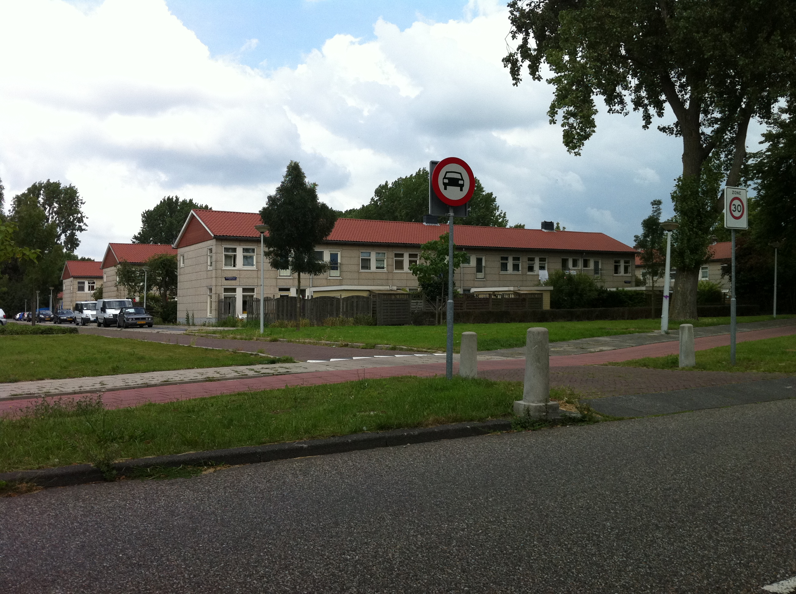 Deel van Tuindorp Oostzaan Amsterdam-Noord, gebouwd in de jaren 50 van de 20e eeuw.